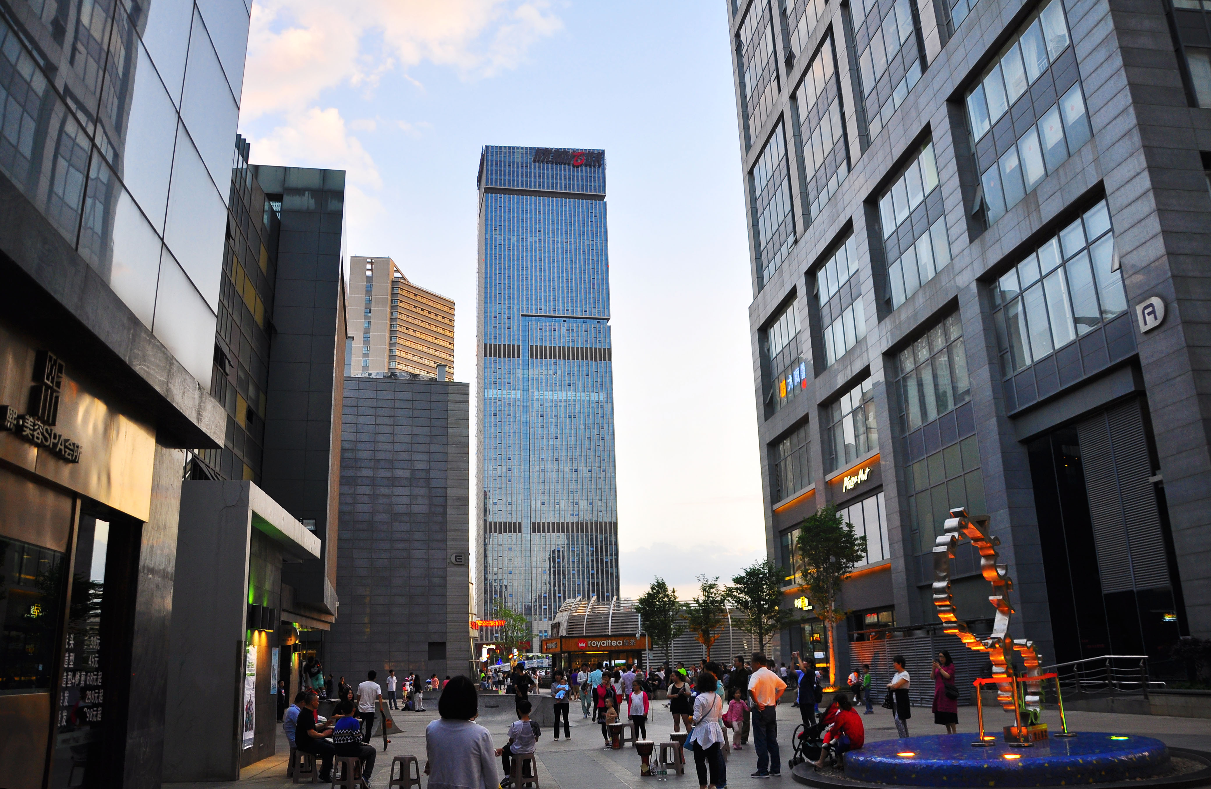 昆明北市区北辰商圈。